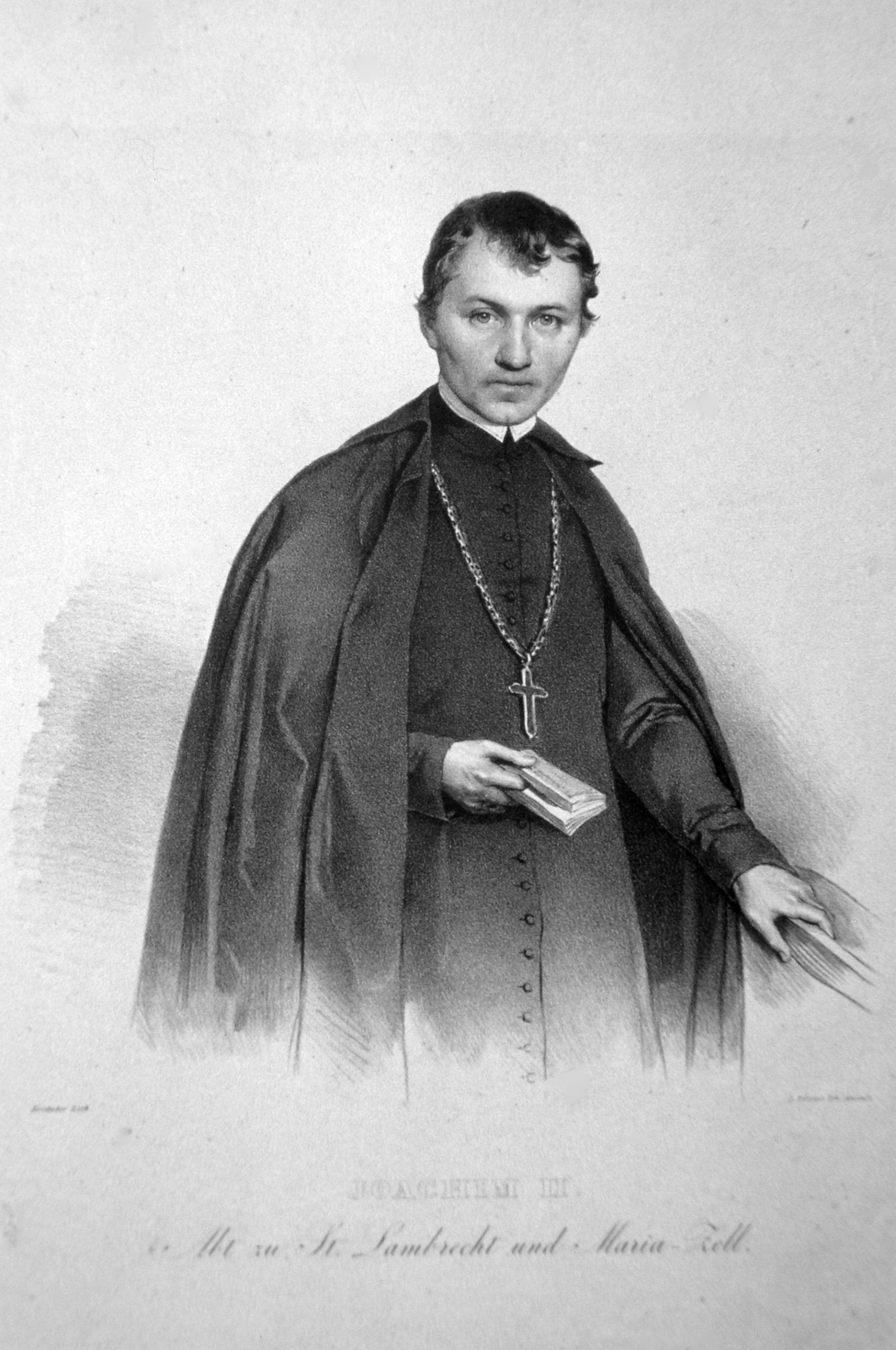 Joachim Suppan (1794-1864), ab 1835 Abt der Benediktinerabtei St. Lambrecht (Stmk). Lithographie von Josef Kriehuber, ca. 1850